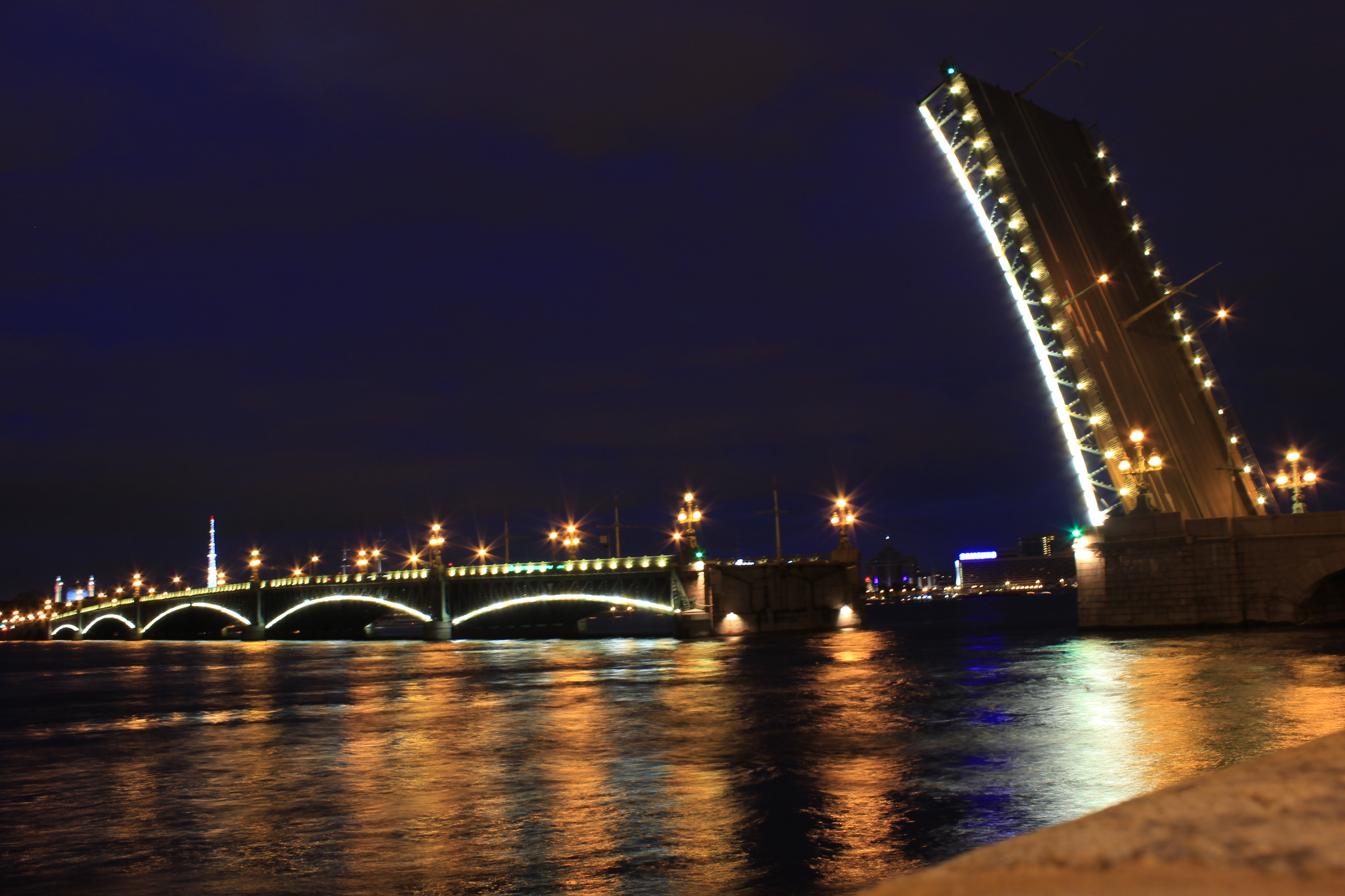 Троицкий мост, Санкт-Петербург